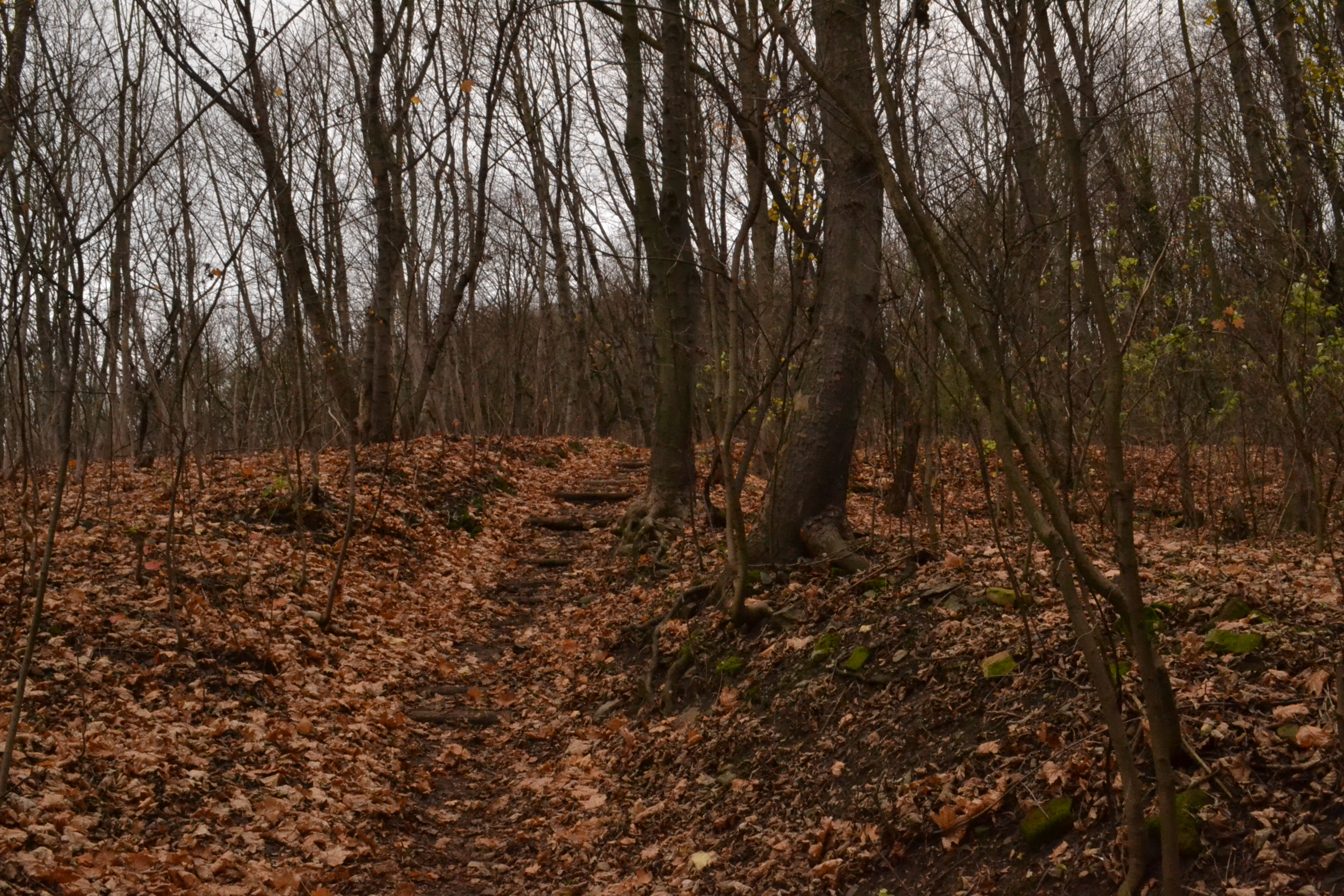 Podzimní Podhoří